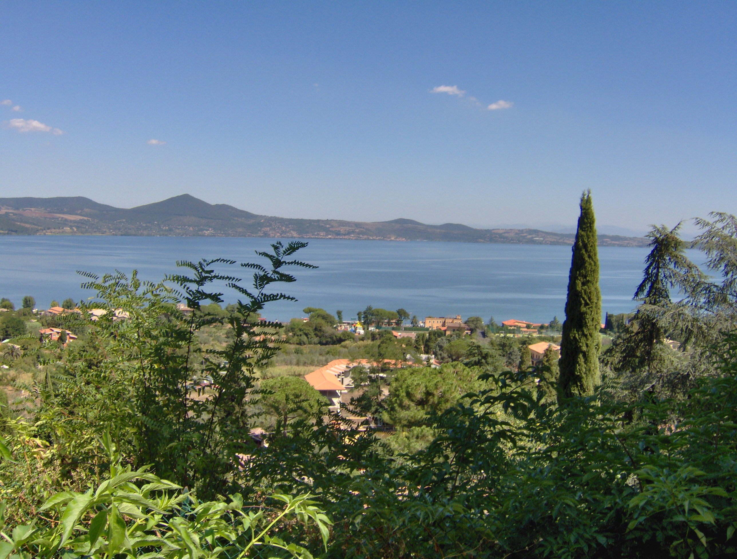 Panoramica del Lago di Bracciano con vegetazione ed edifici lungo la sponda.